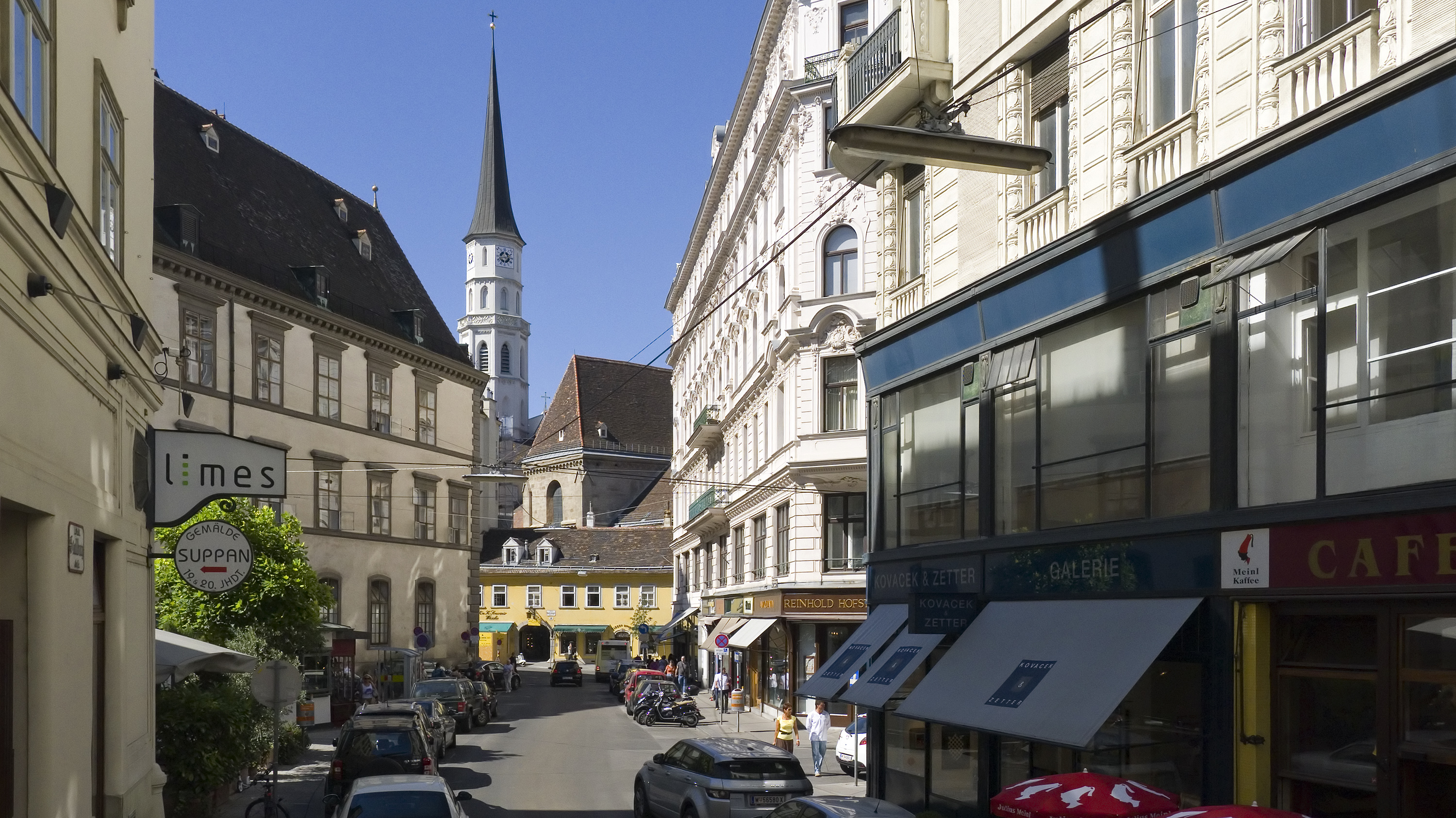 Stallburggasse in Wien 1 bei Nr. 3 Richtung Nordwesten